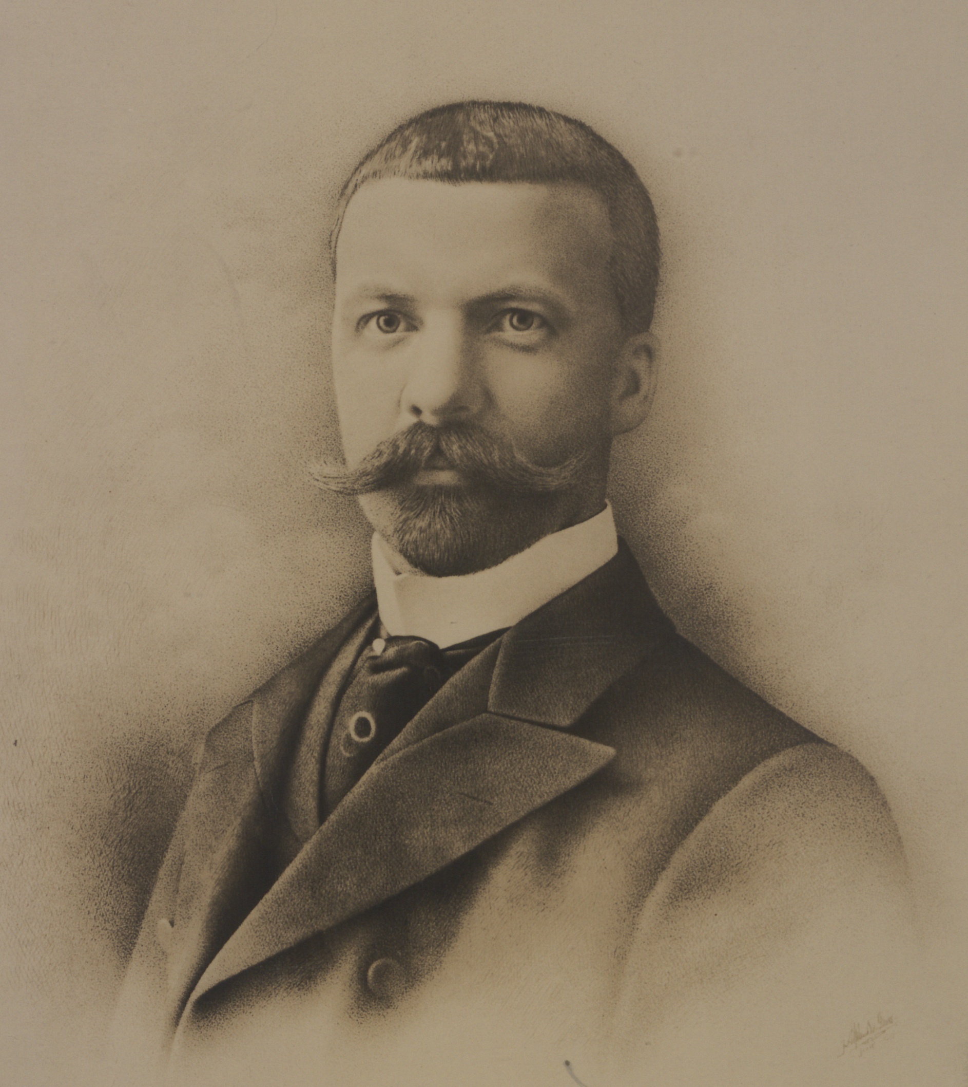 M. Henri Bourassa, M.P.P.